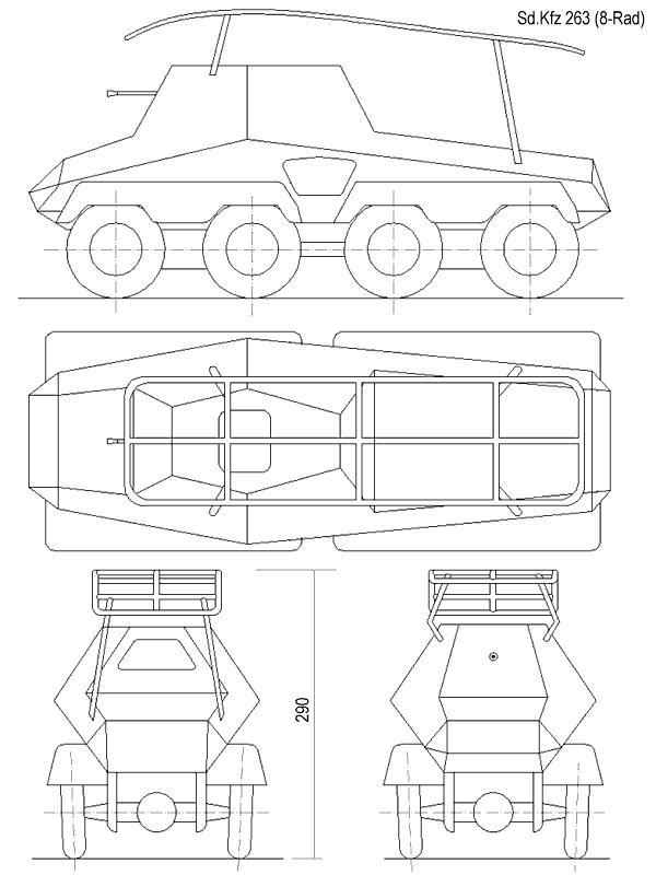 Sd.Kfz. 263 (8-Rad) Panzerfunkwagen - rzuty